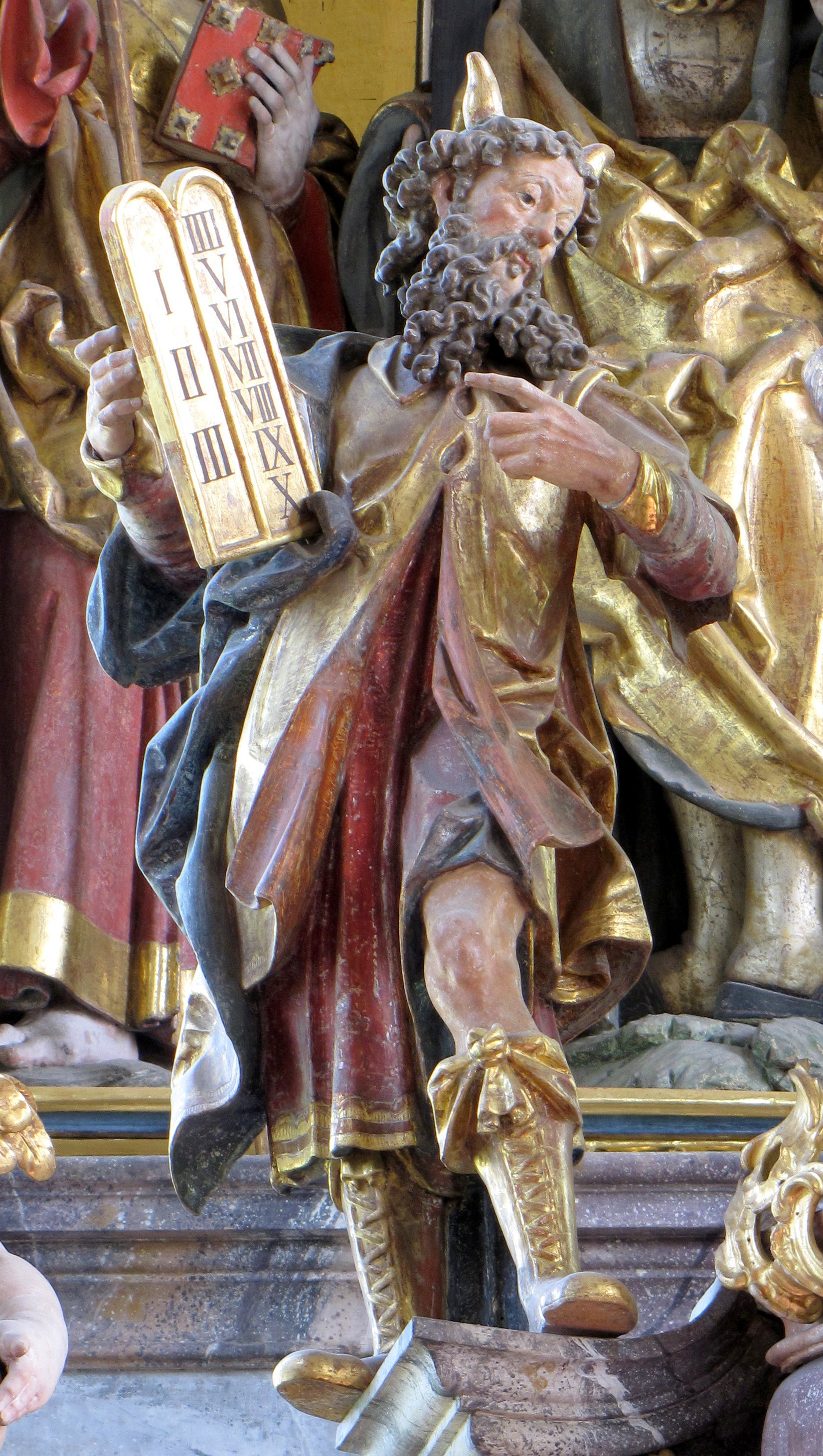 Die Figur des Moses als Detail des Tabernakelaltars der Wallfahrtskirche Maria Rain